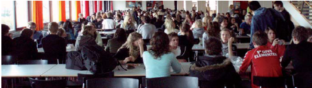 Gymnasieelever